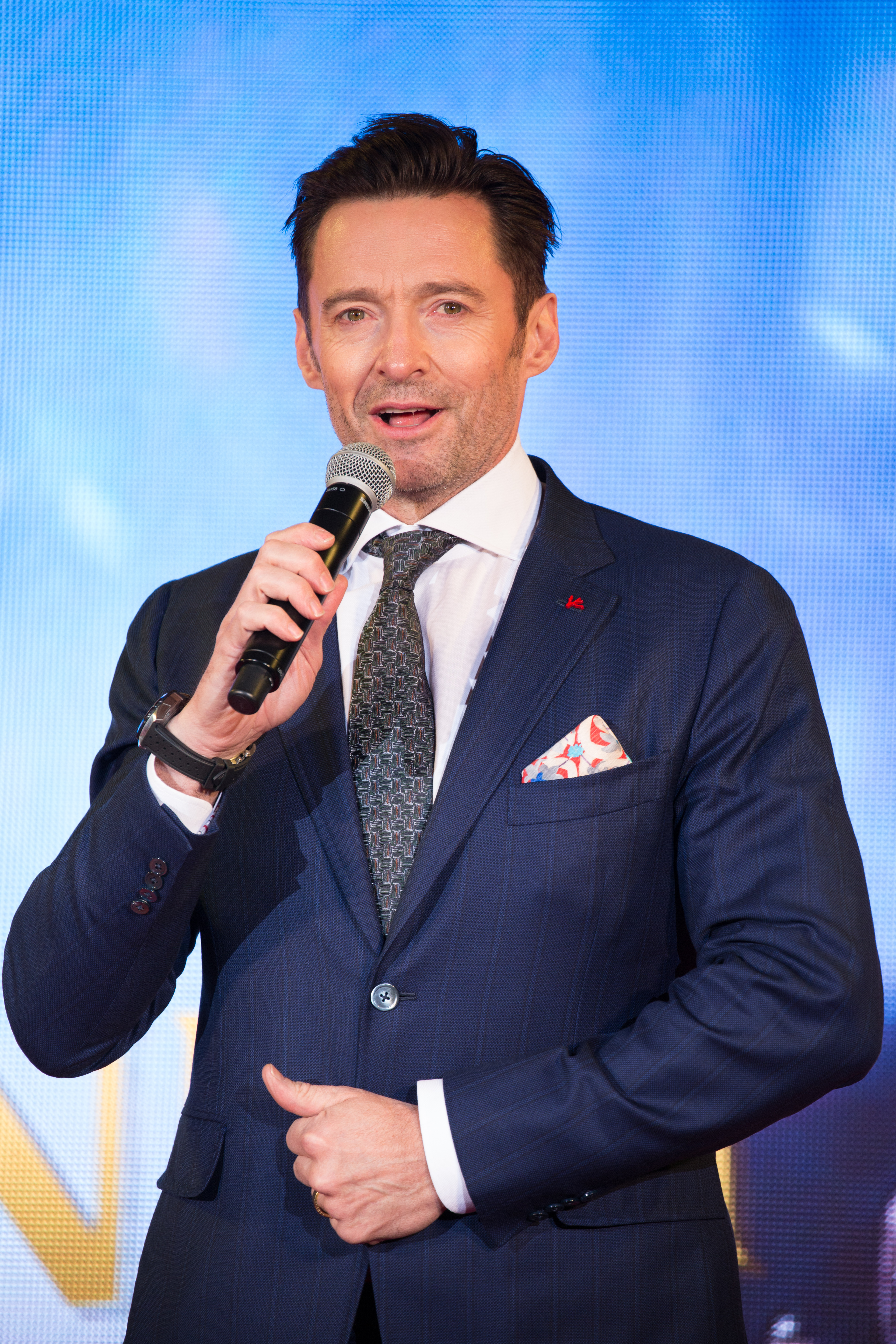 グレイテスト・ショーマン ジャパン・プレミア レッドカーペット ヒュー・ジャックマン